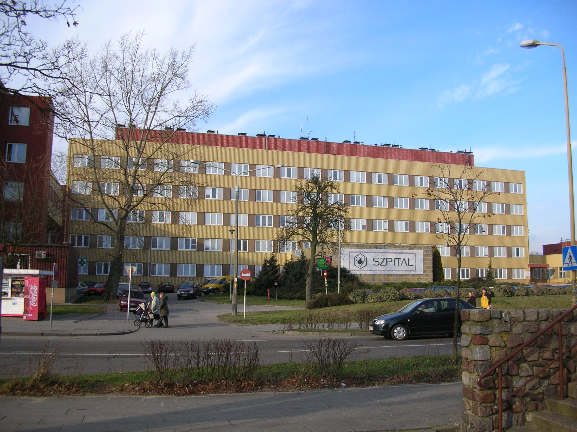 Pomeranian Medical University, the hospital in Police, town in Pomerania, Poland / Szpital Pomorskiej Akademii Medycznej, Police, Polska